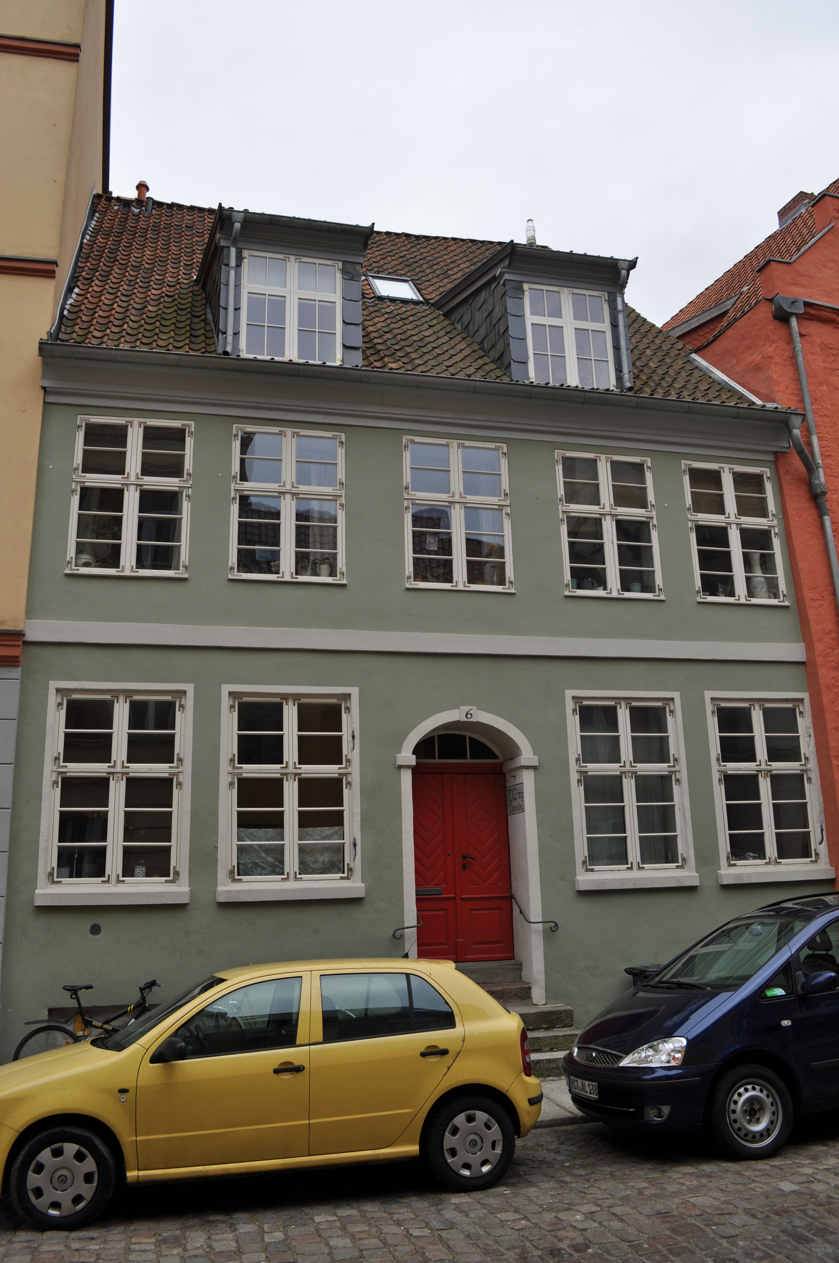 Gebäude bzw. Gebäudedetail in Stralsund. Straße und Hausnummer siehe Dateiname.